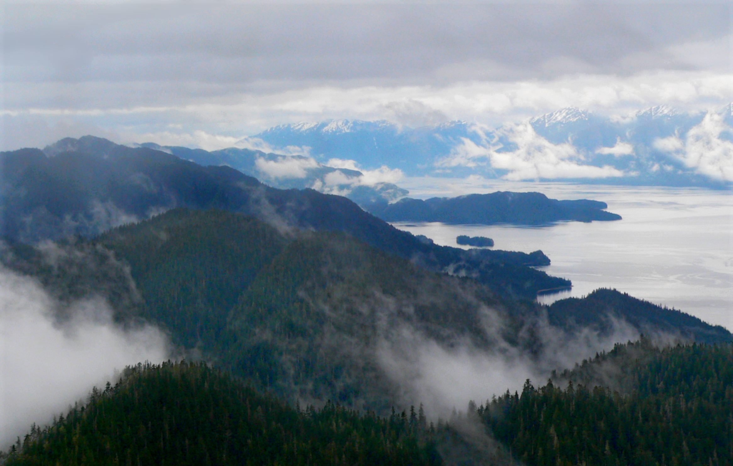 Misty Fjords, near Ketichikan, Alaska.